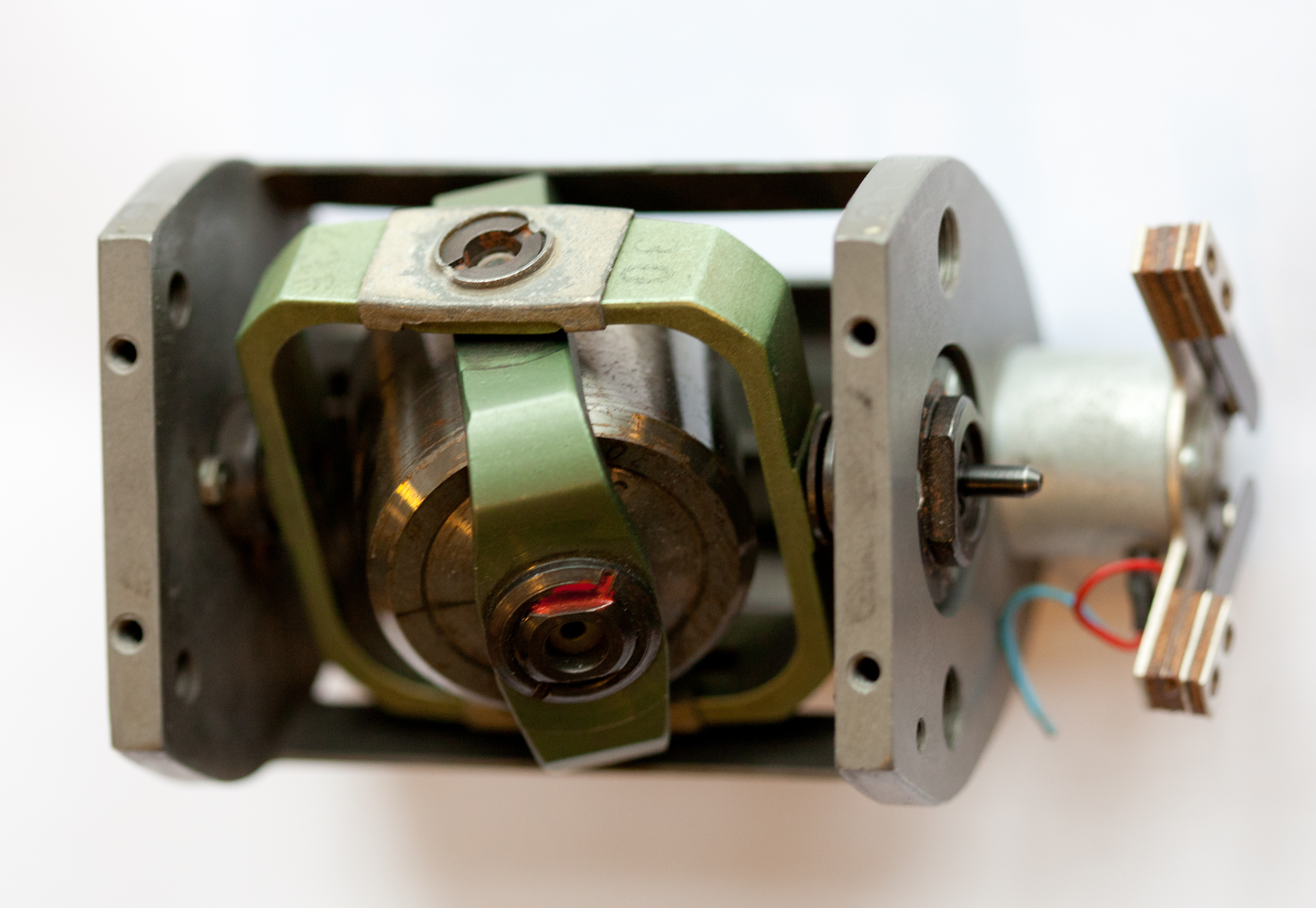 Künstlicher Horizont